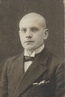 Alfred Koort, eesti filosoof